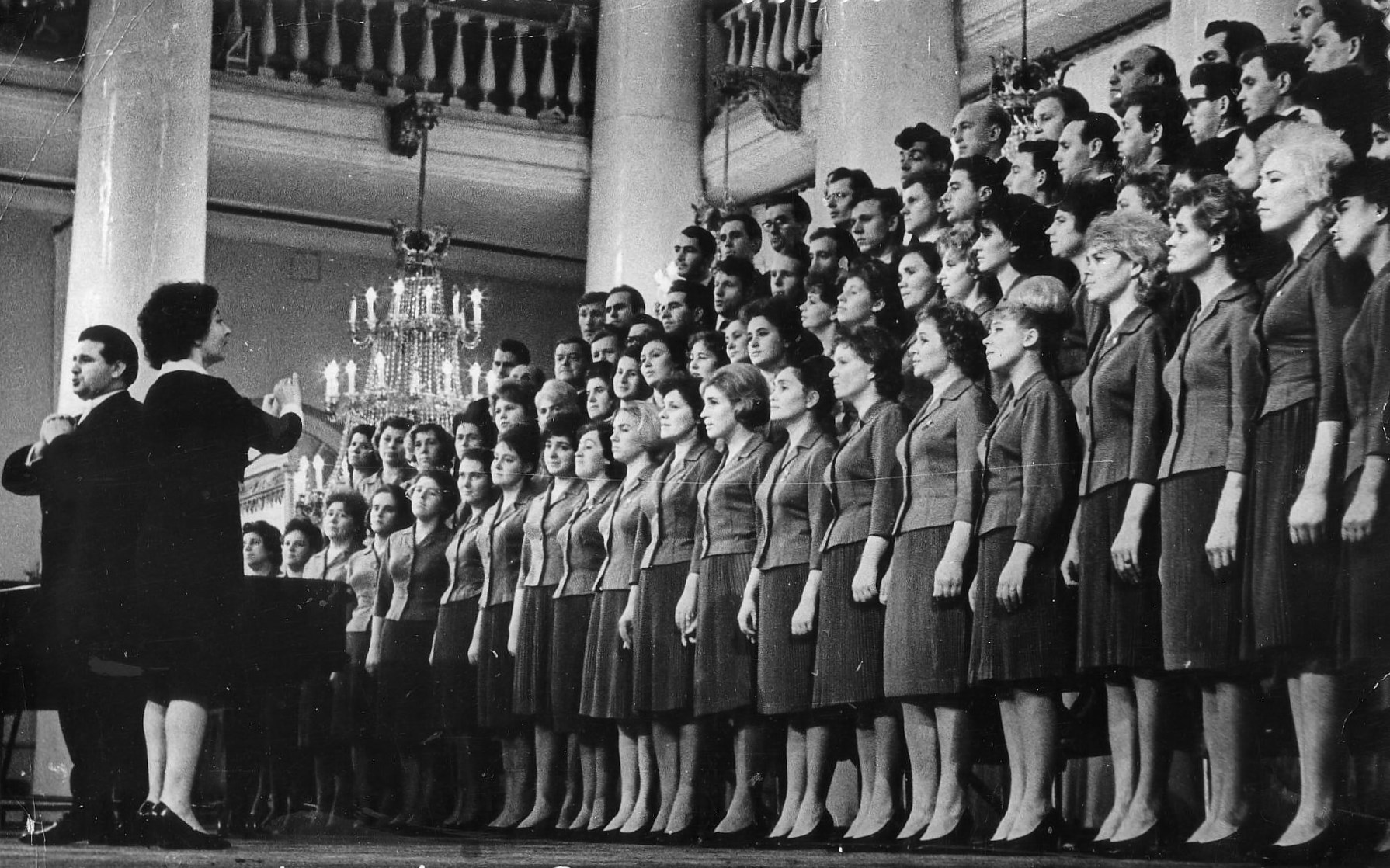 Ивановский хор текстильщиков в Доме союзов 05 декабря 1965г.